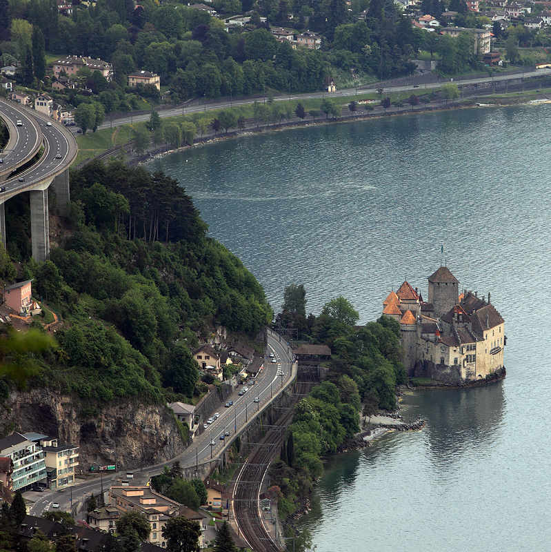 Вид из Глиона на авторут и замок Шильон